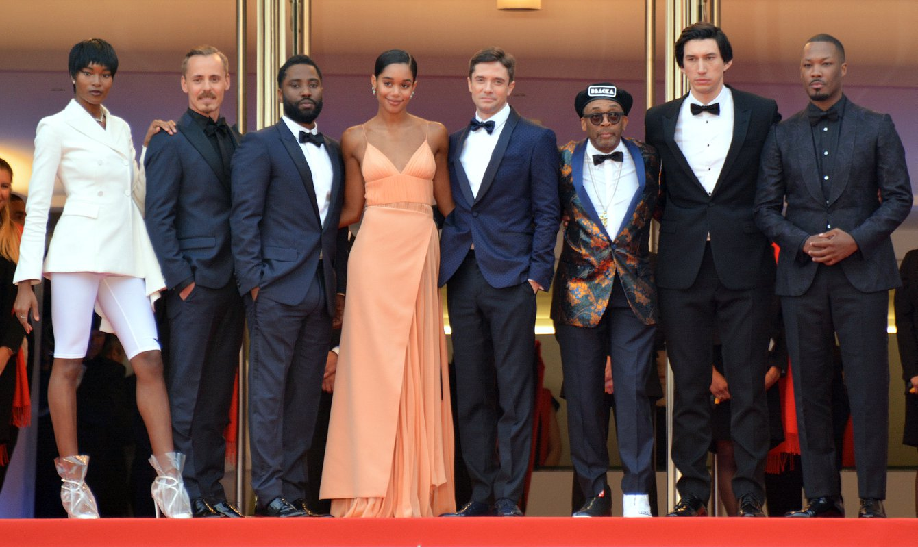 Présentation du film BlacKkKlansman au festival de Cannes : Damaris Lewis, Jasper Pääkkönen, John David Washington, Laura Harrier, Topher Grace, Spike Lee, Adam Driver, Corey Hawkins.